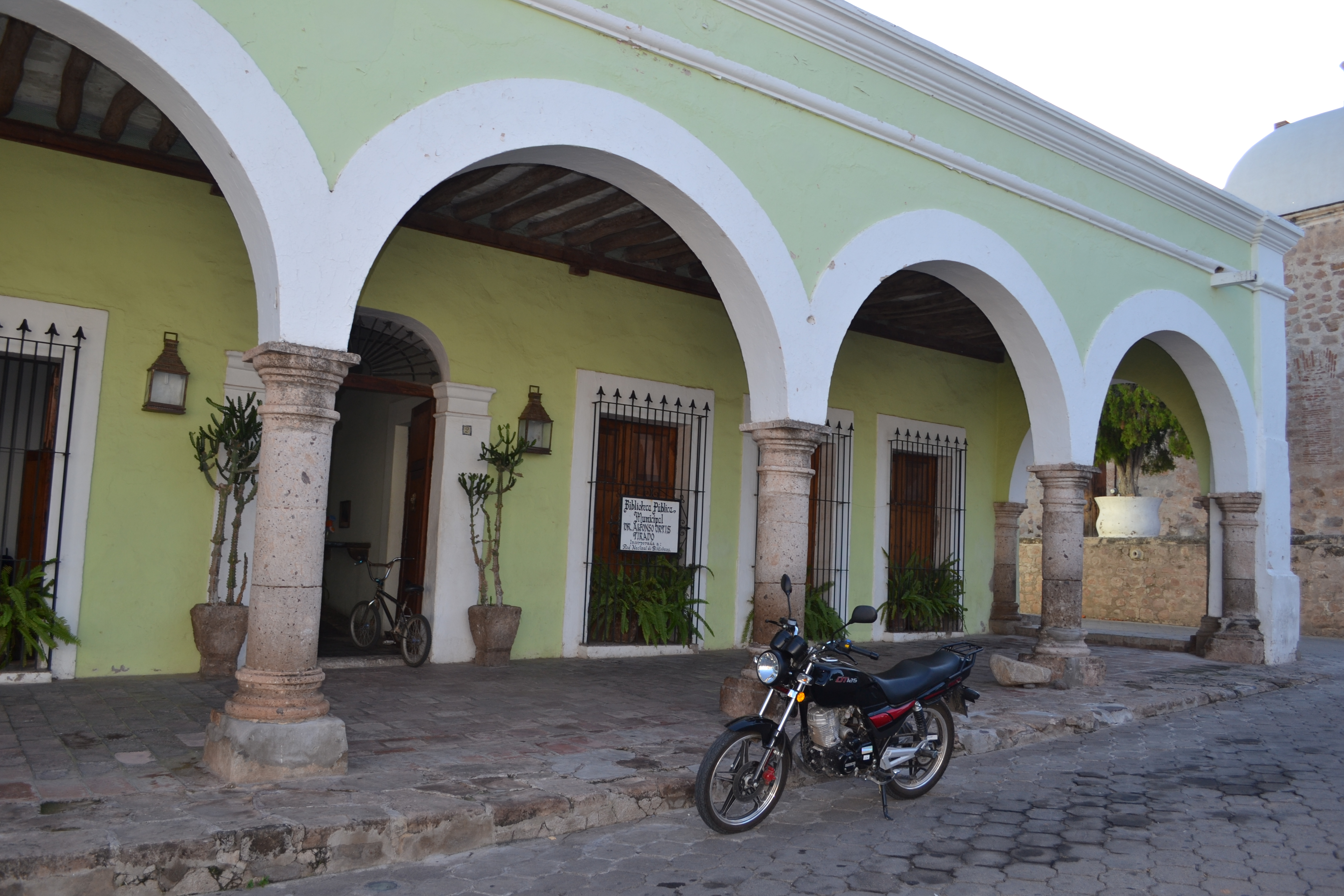 Biblioteca Pública Municipal Dr. Alfonso Ortiz Tirado